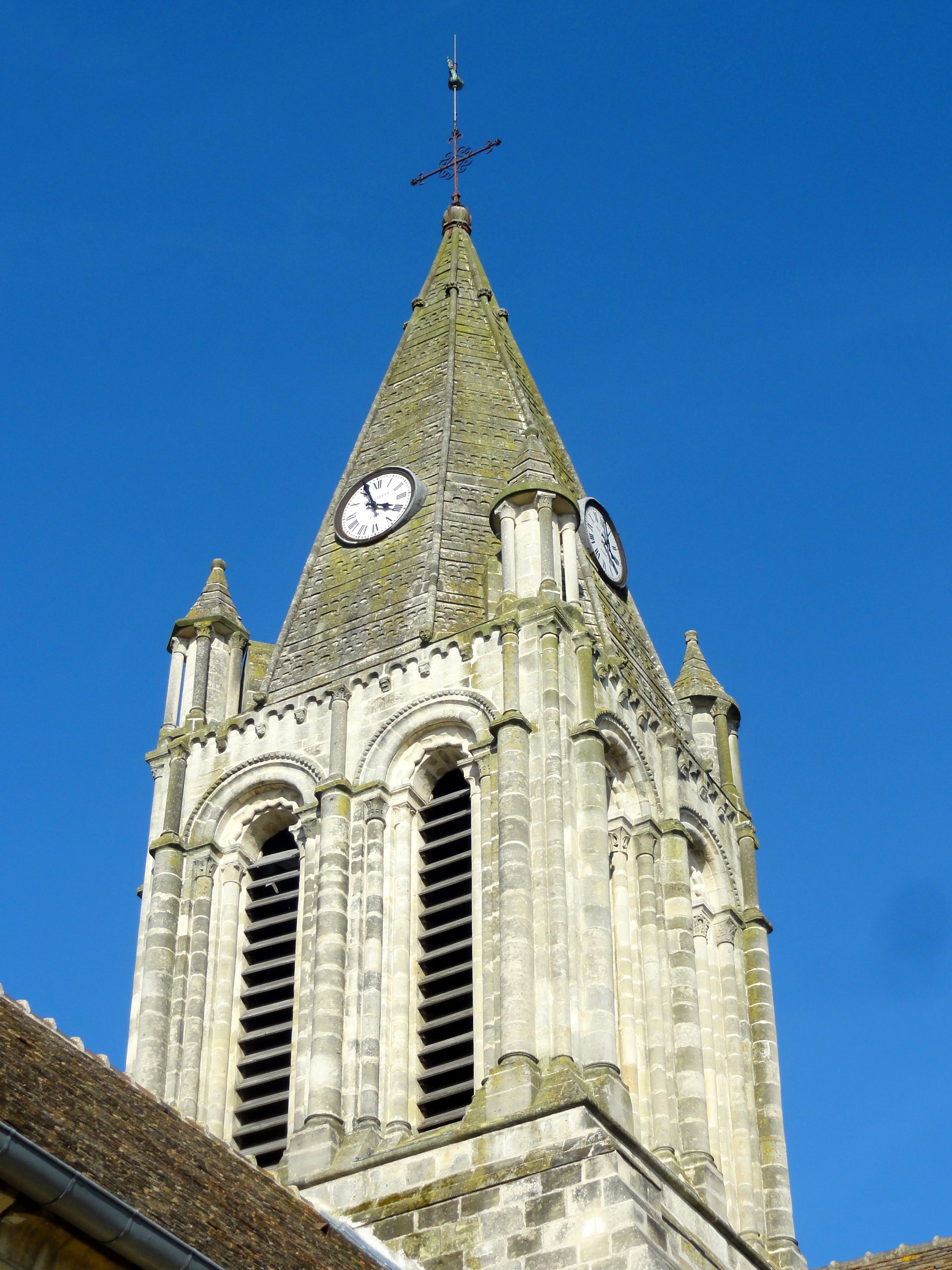 Clocher.